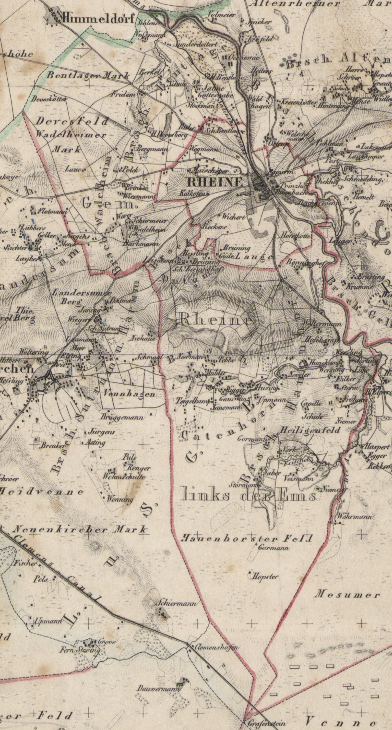 Location of Rheine links der Ems